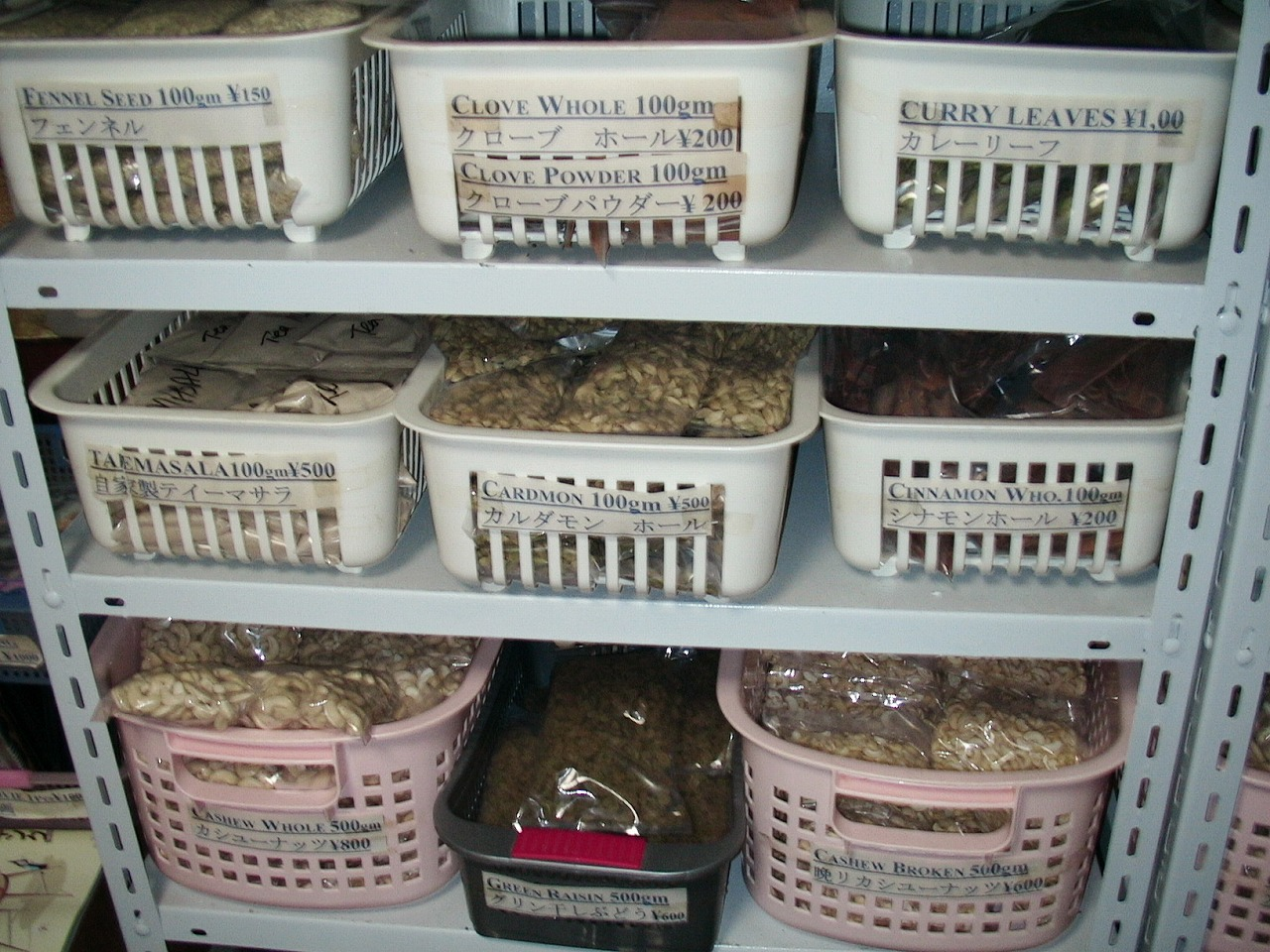 神戸市中央区インド食材輸入会社の倉庫・スパイス類